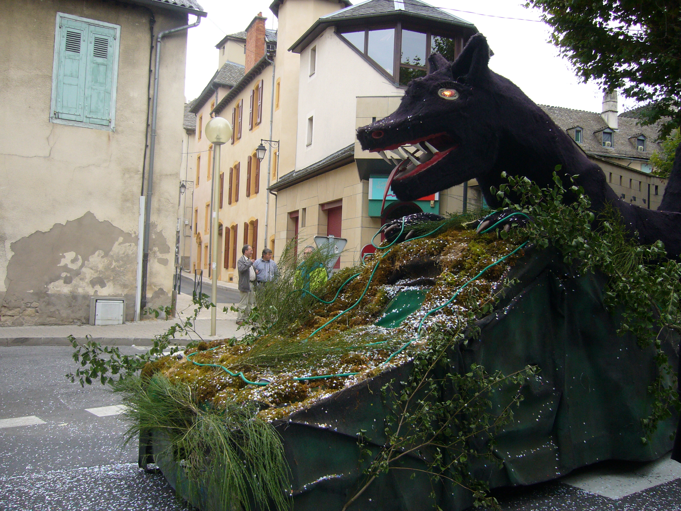 Corso fleuri lors des grandes fêtes de Mende (août 2013) : le char de la Bête du Gévaudan